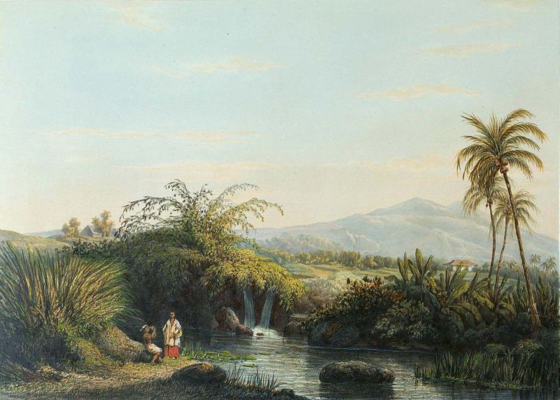 Litho. Litho naar een oorspronkelijk schilderij van A. Salm.. Het landschap in Cilibut